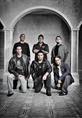 Arriba: Andersond Jimenez, Irving Sivanovich y Leonard Stark Abajo: Ramon Leonardo, Miguel Pemat y Manuel Herrera